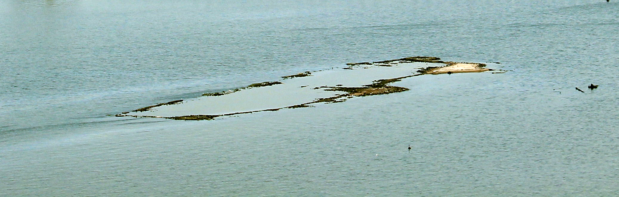 Bayıl qəsrinin qalıqları 5